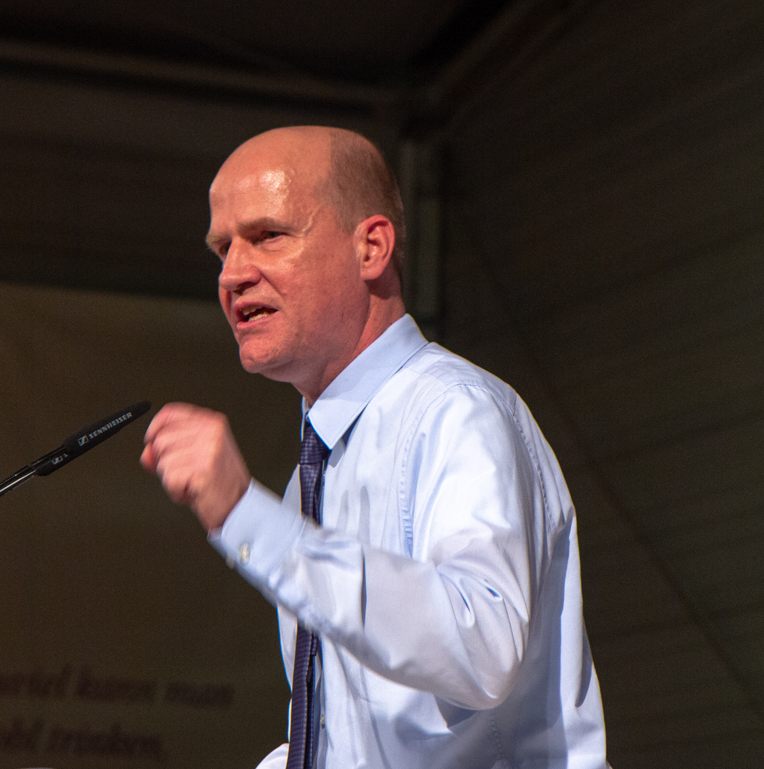 Ralph Brinkhaus beim Politischer Aschermittwoch der CDU Thüringen am 6. März 2019 in Apolda.